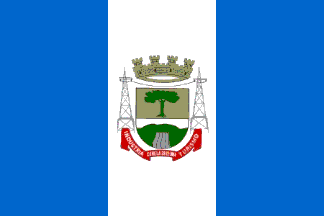 Bandeira do Município de Canela, RS, Brasil